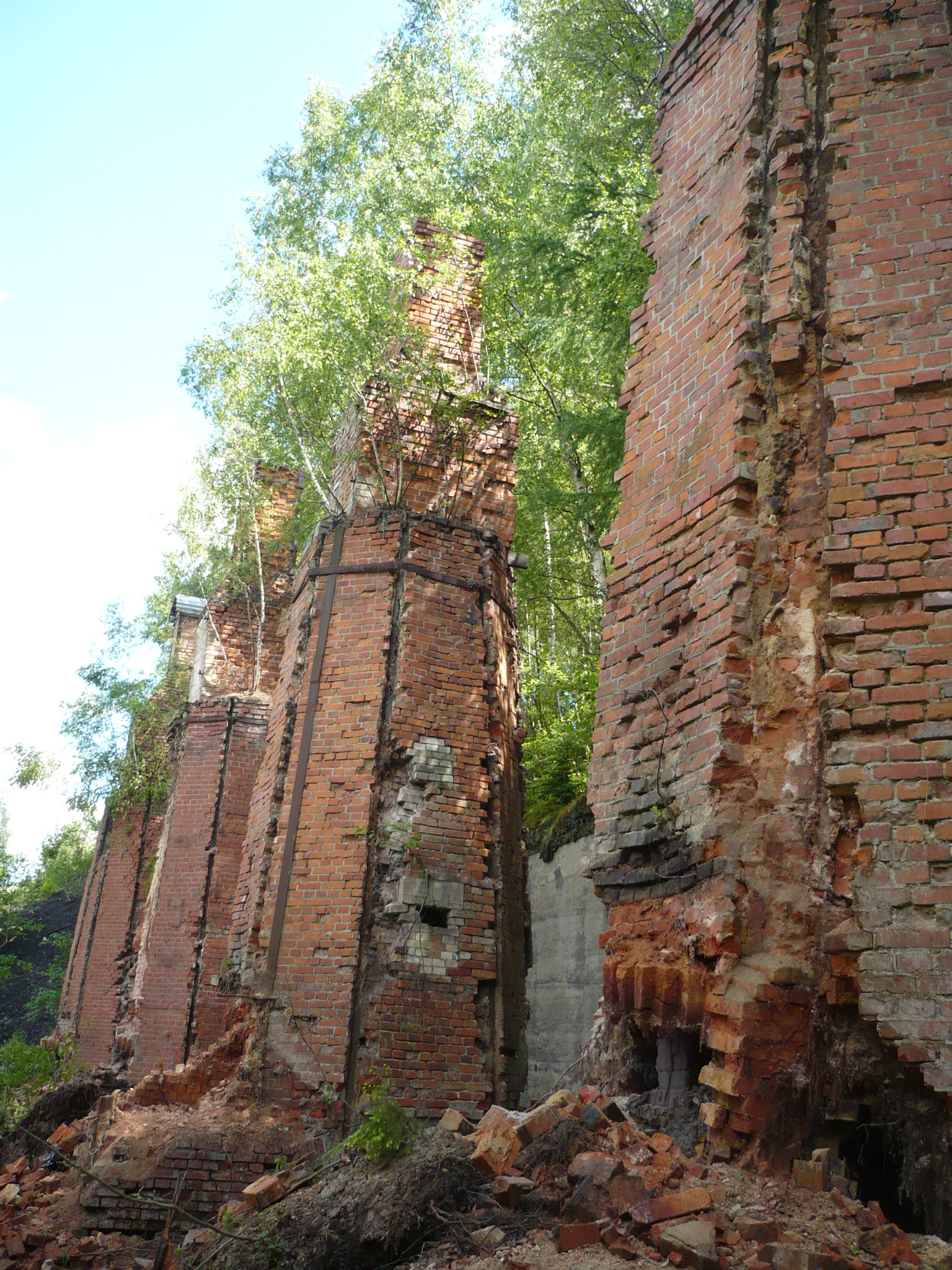 Nowa Ruda, piece do prażenia łupku